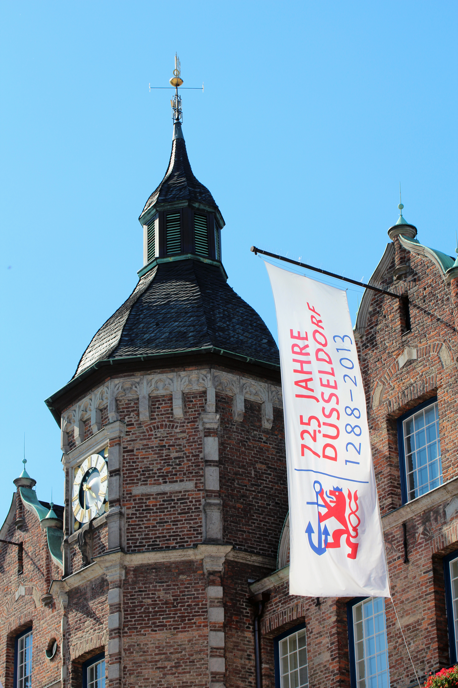 725 Jahre Düsseldorf, 1288-2013, Fahne am Rathaus Düsseldorf.